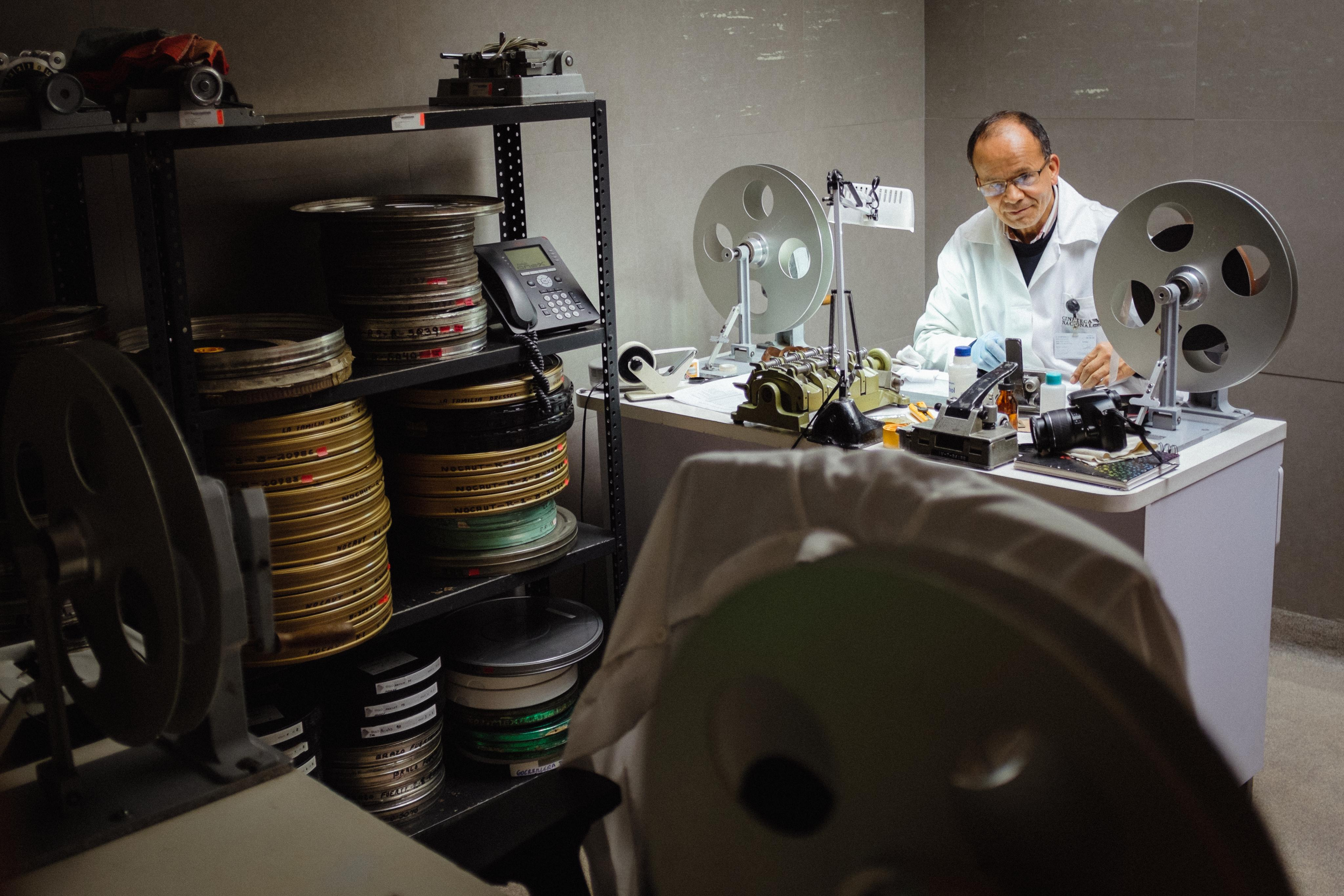 Nitrate film restoration